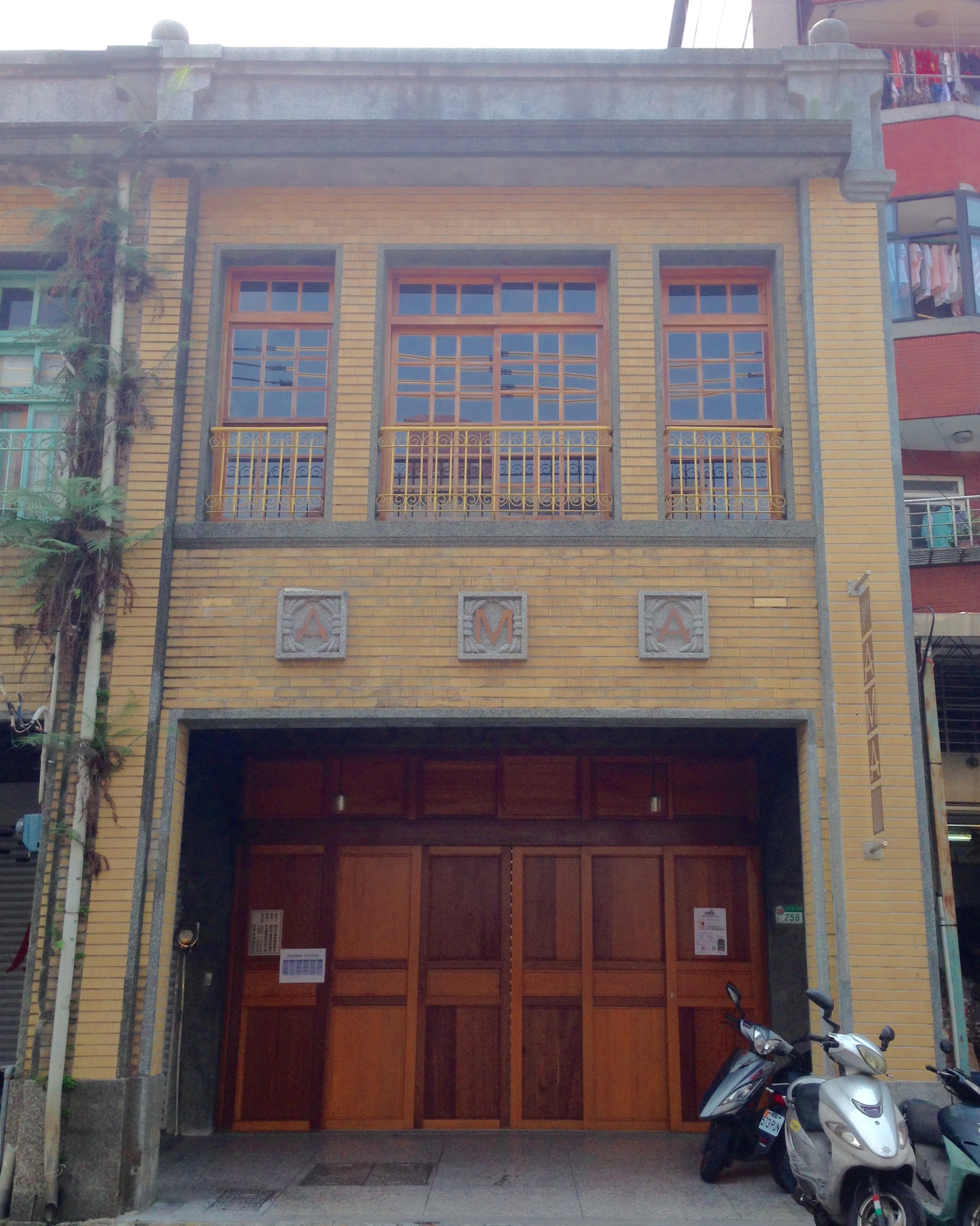 阿嬤家-和平與女性人權館，位於臺灣臺北市大同區迪化街一段256號。